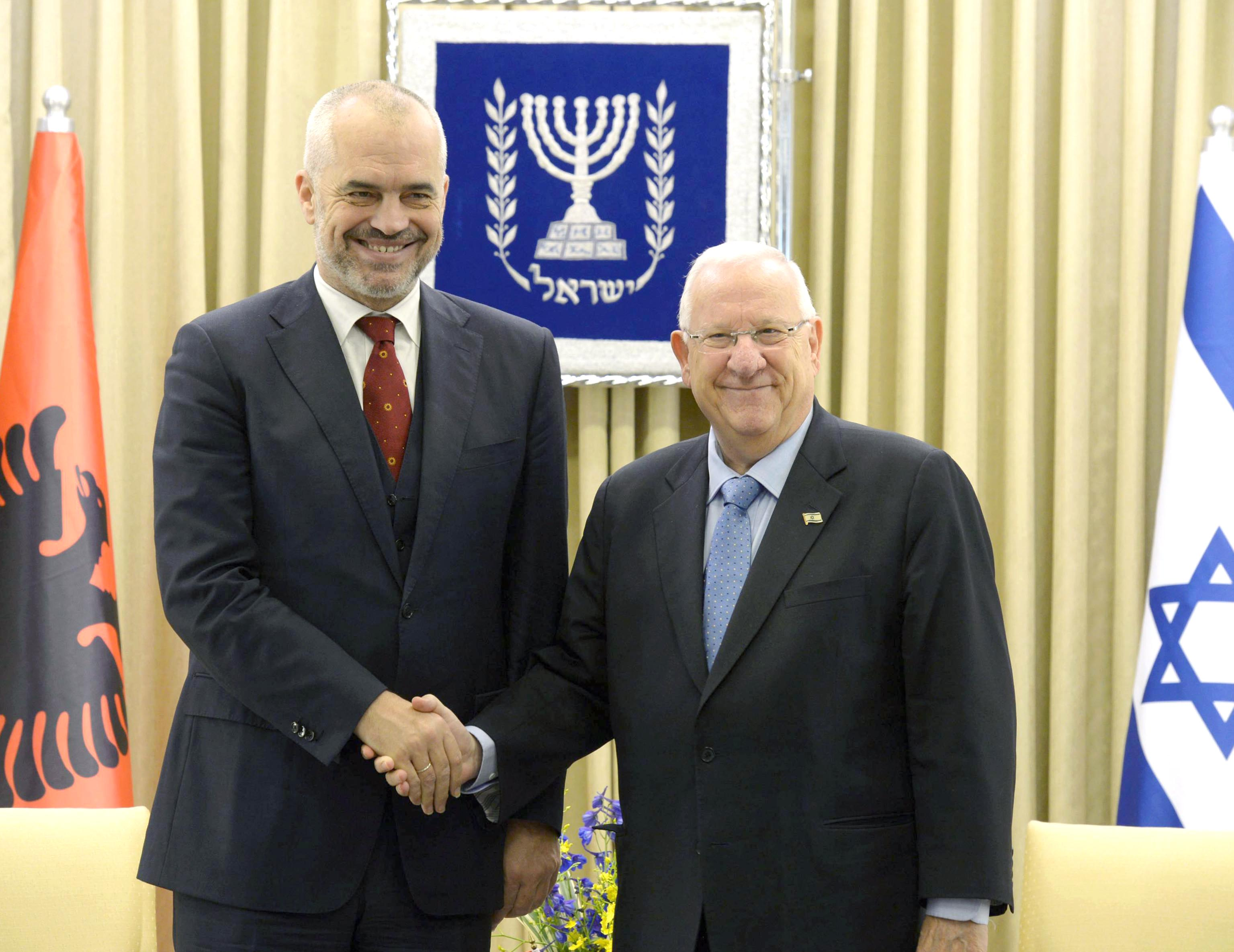 ביקור ראש ממשלת אלבניה אדי רמה בישראל עם נשיא מדינת ישראל ראובן ריבלין